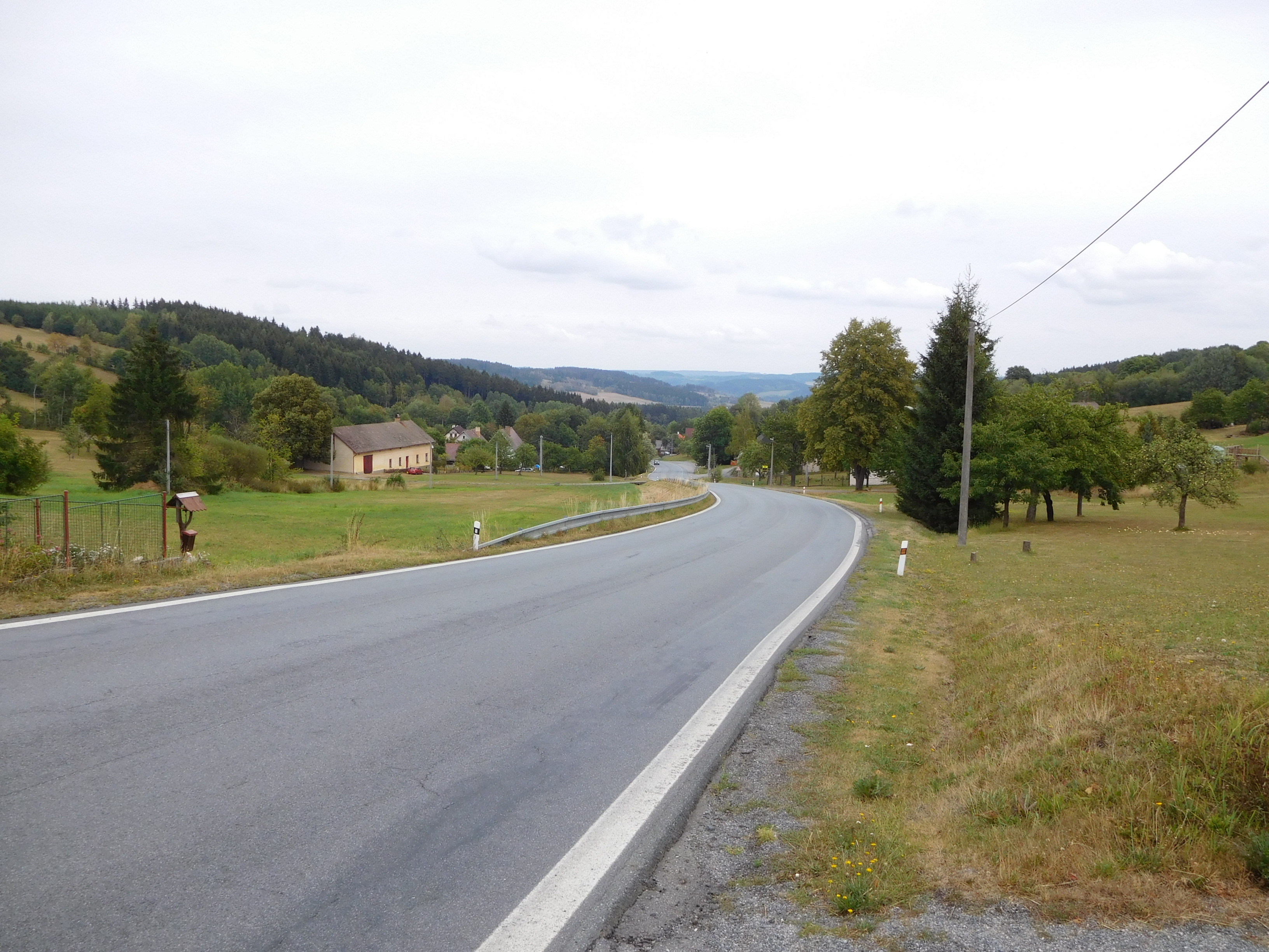 Roženecké Paseky - celkový pohled od jihozápadu